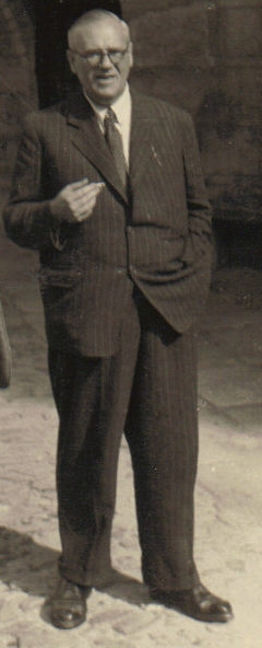 český historik Ladislav Hosák